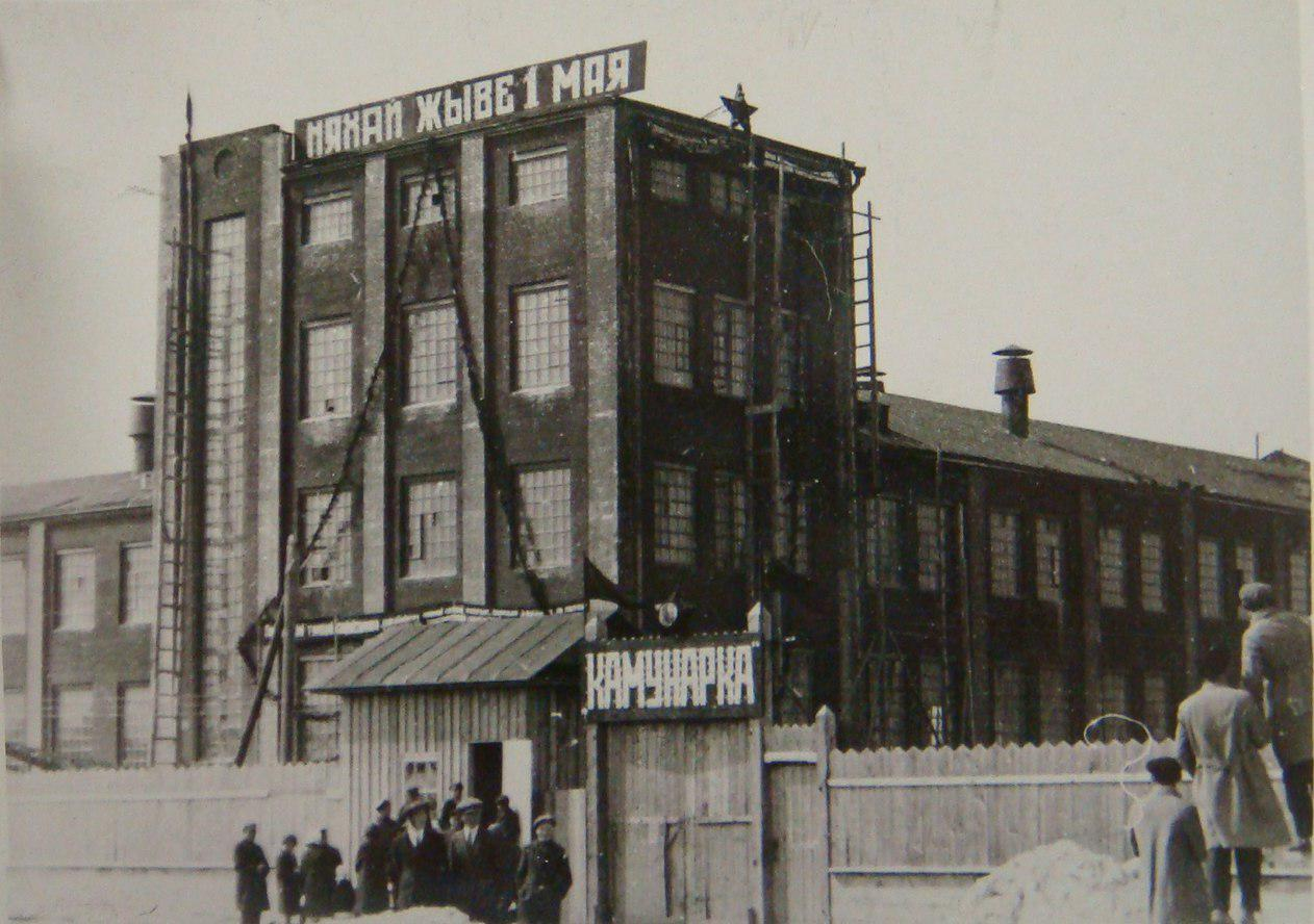 Беларуская (тарашкевіца): Менск (Miensk), Тры Карчмы (Try Karčmy). Фабрыка Камунарка